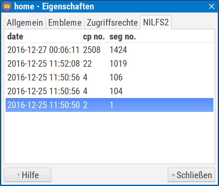 Thunar NILFS2 Snapshotanzeigeplugin